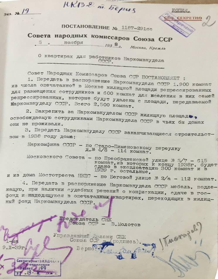 Данным постановлением комнаты, изъятые у репрессированных лиц, передаются сотрудникам Наркомвнудела СССР.